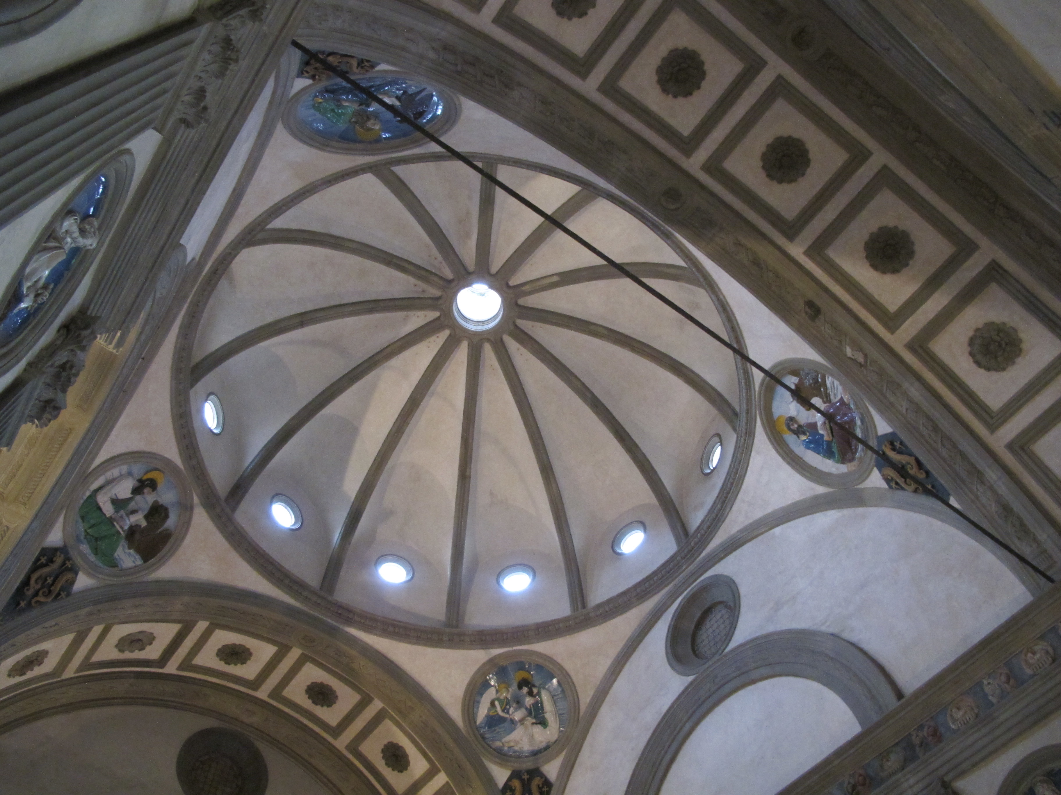 firenze 2011